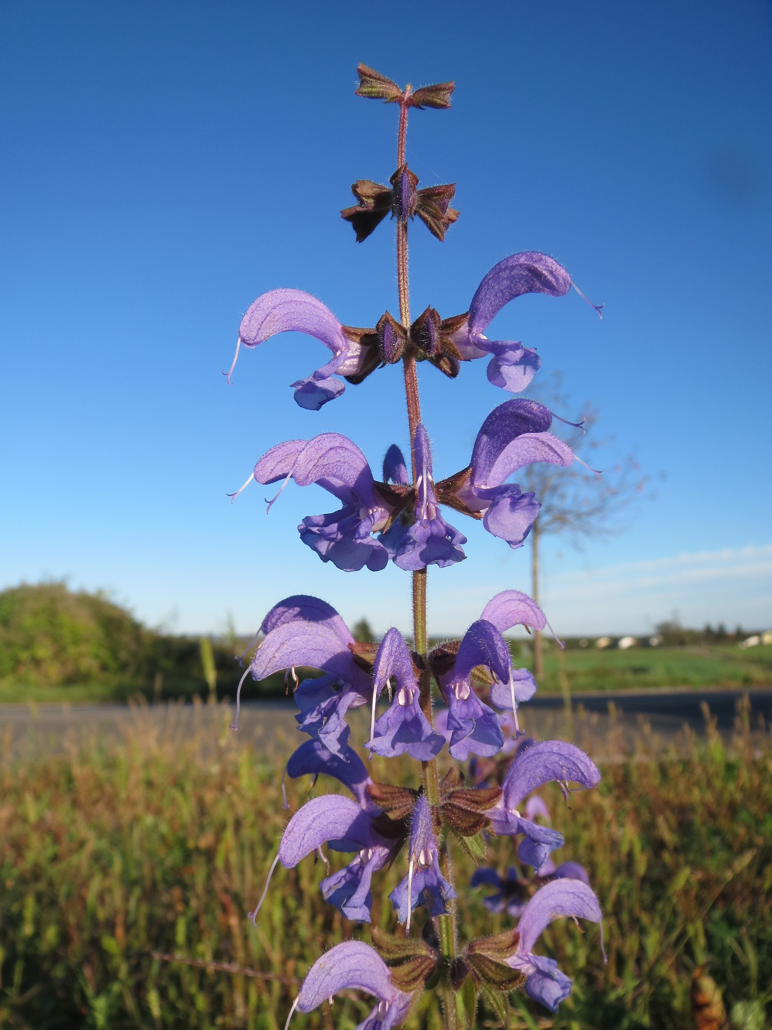 Wiesensalbei (Salvia pratensis) bei Ketsch